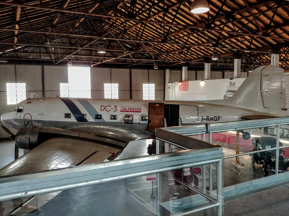 il dc 3 esposta al Parco e Museo di Volandia